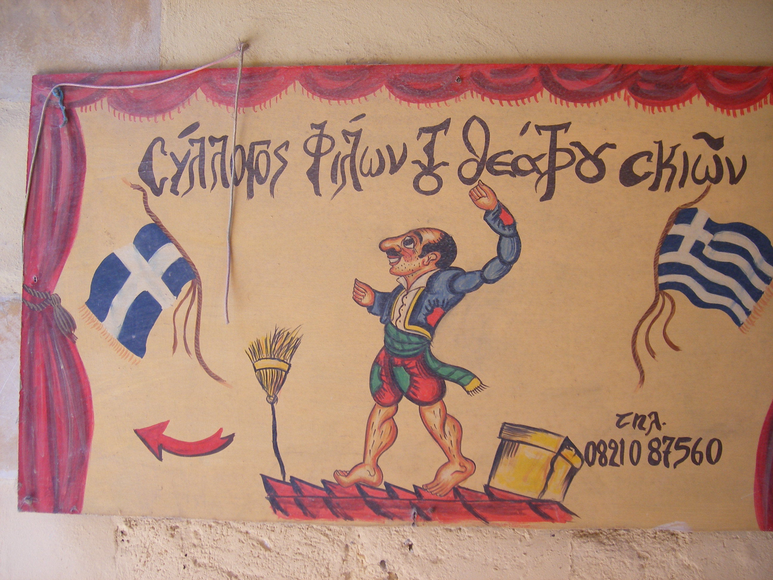 Karaghiozis. La Canée, Crète